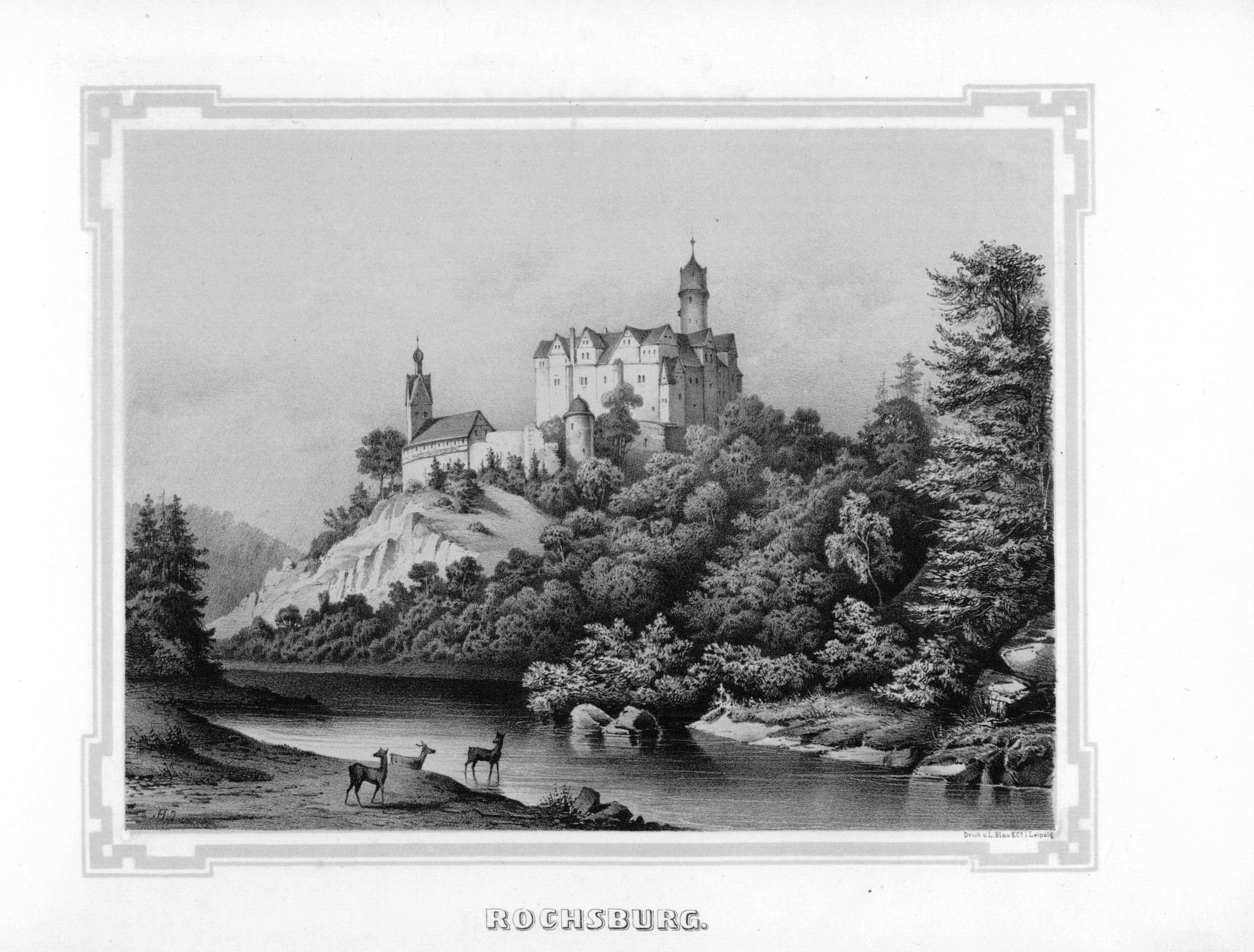 Rochsburg aus: Album der Rittergüter und Schlösser im Königreiche Sachsen Leipziger Kreis Section: I